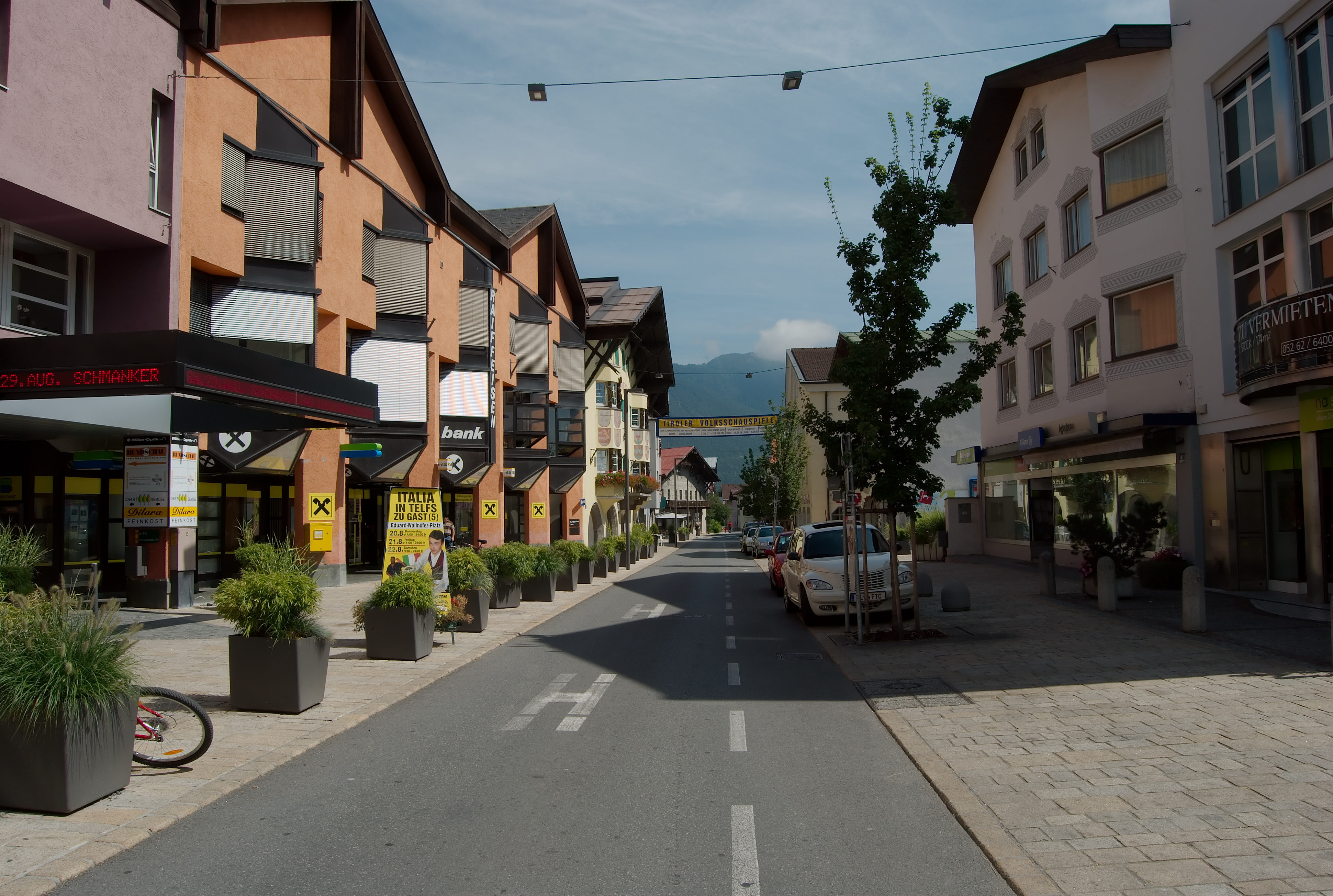 Ulice Untermarktstrasse v tyrolském městysu Telfs